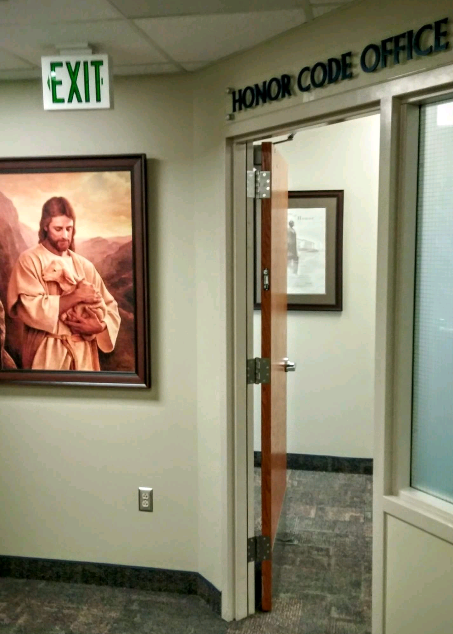 Office entrance